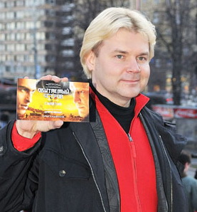 Андрис Лиепа на премьере фильма “Обитаемый остров: СХВАТКА”